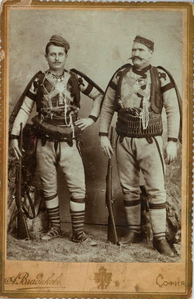 bulgarian revolutionaries